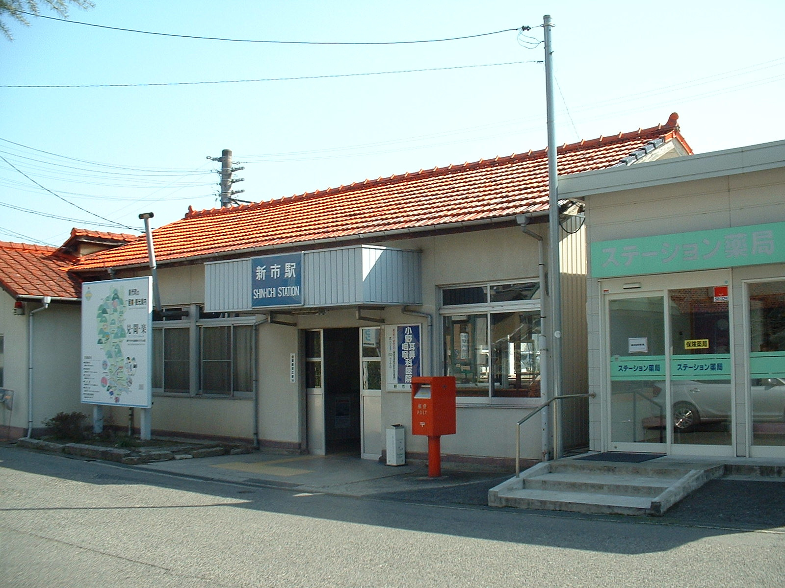 2006年3月25日に投稿者が撮影